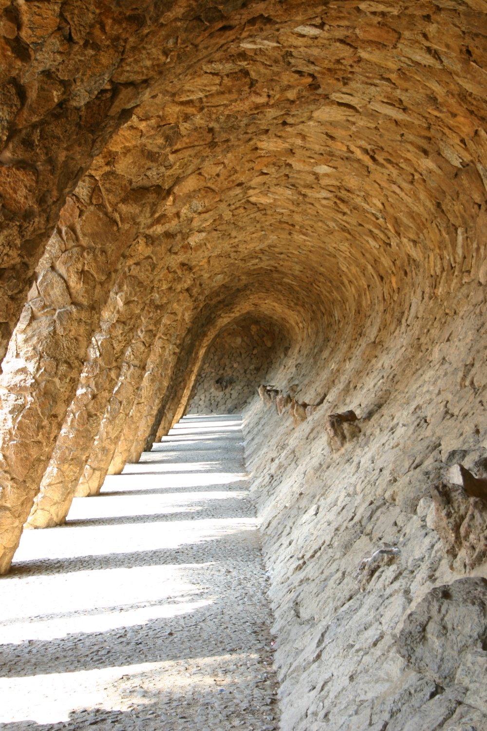 Parc Güell